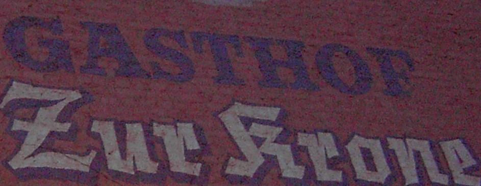 Schriftzug des ehemaligen Gasthofes "Zur Krone" in Stolberg /Rhld.